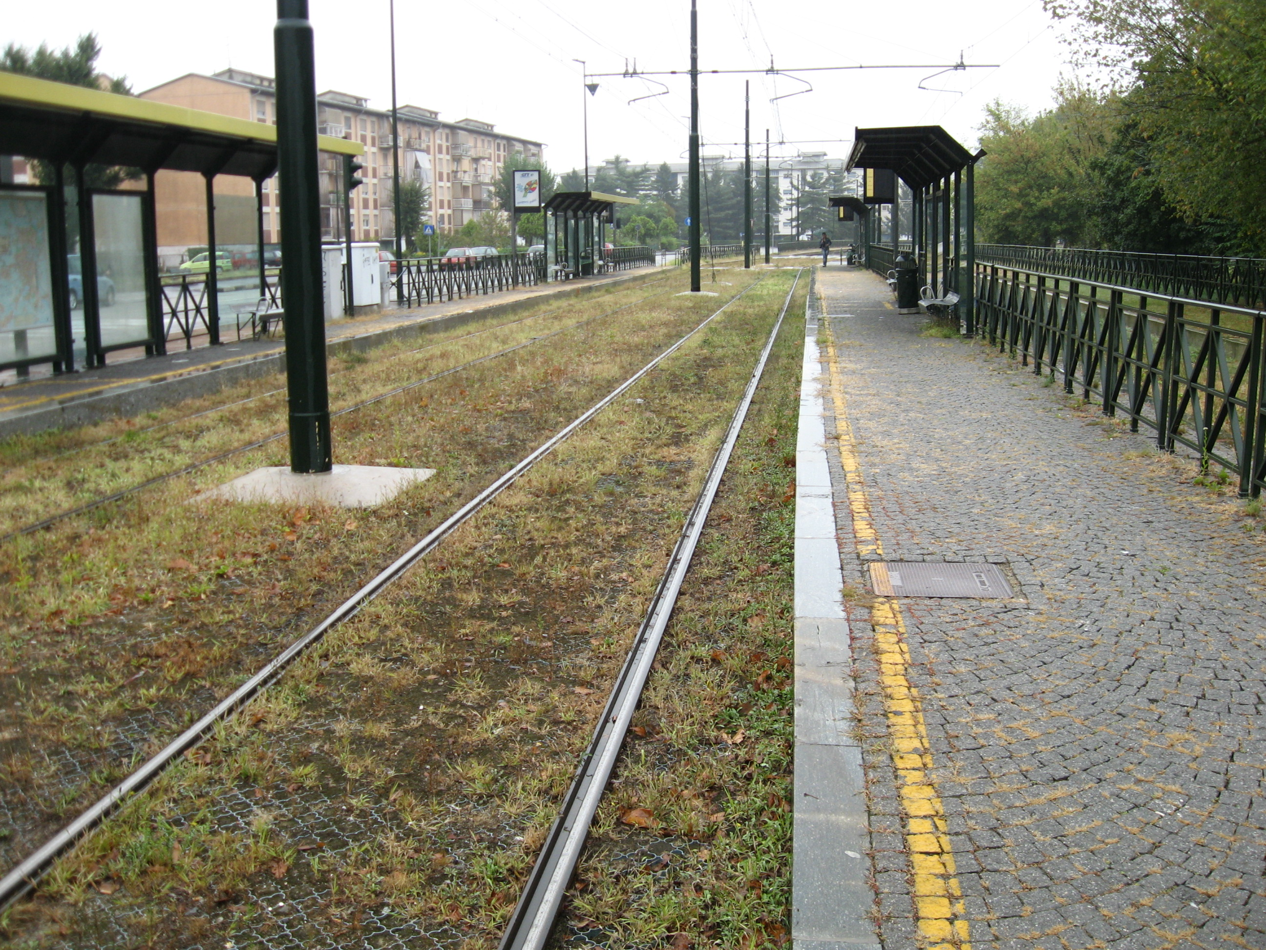 De tram in Turijn in 2009